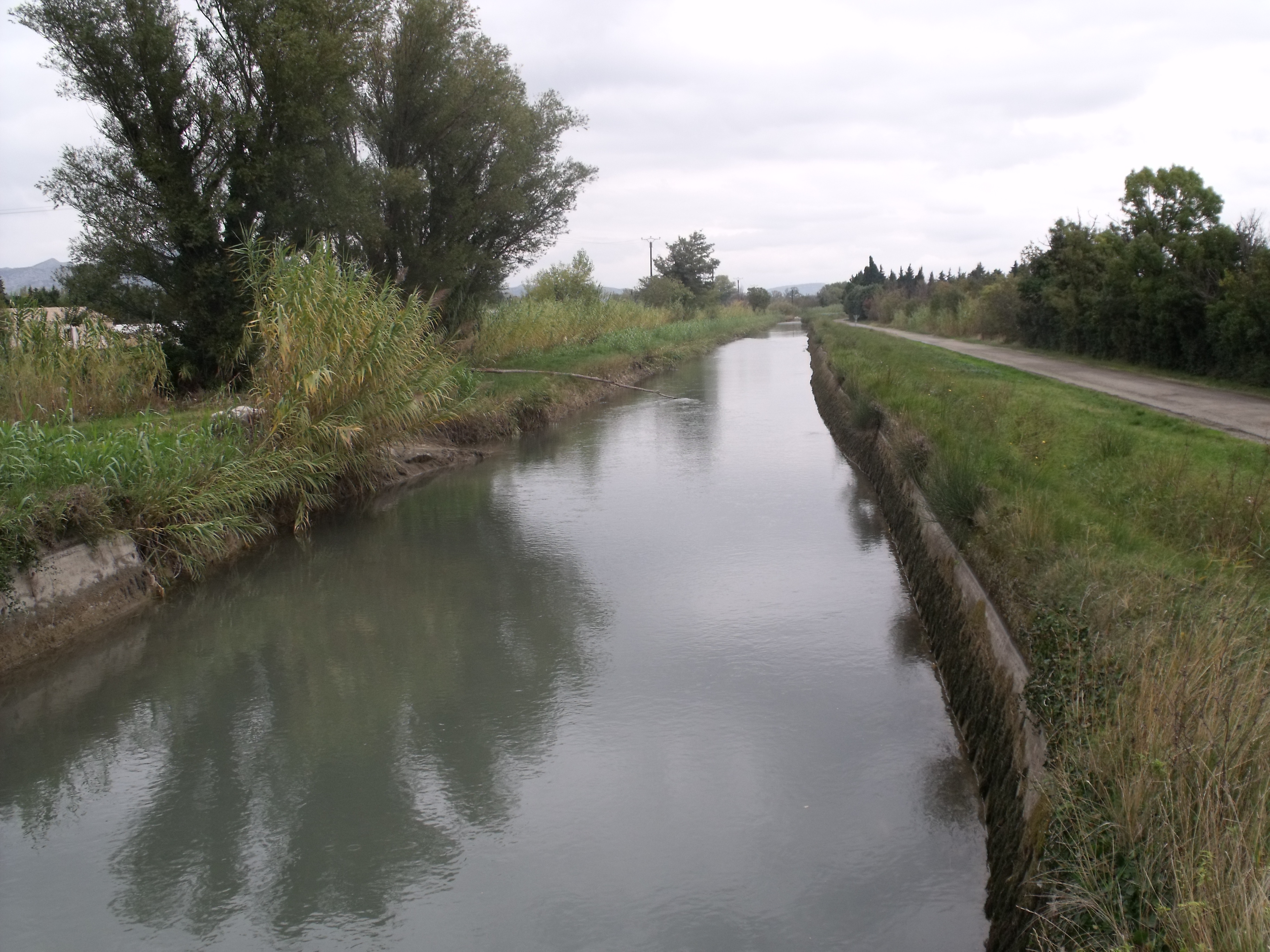 Canal de Craponne depuis la D25b (Aureille, Bouches-du-Rhône)